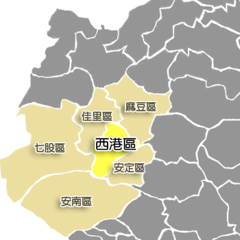 西港區相對位置